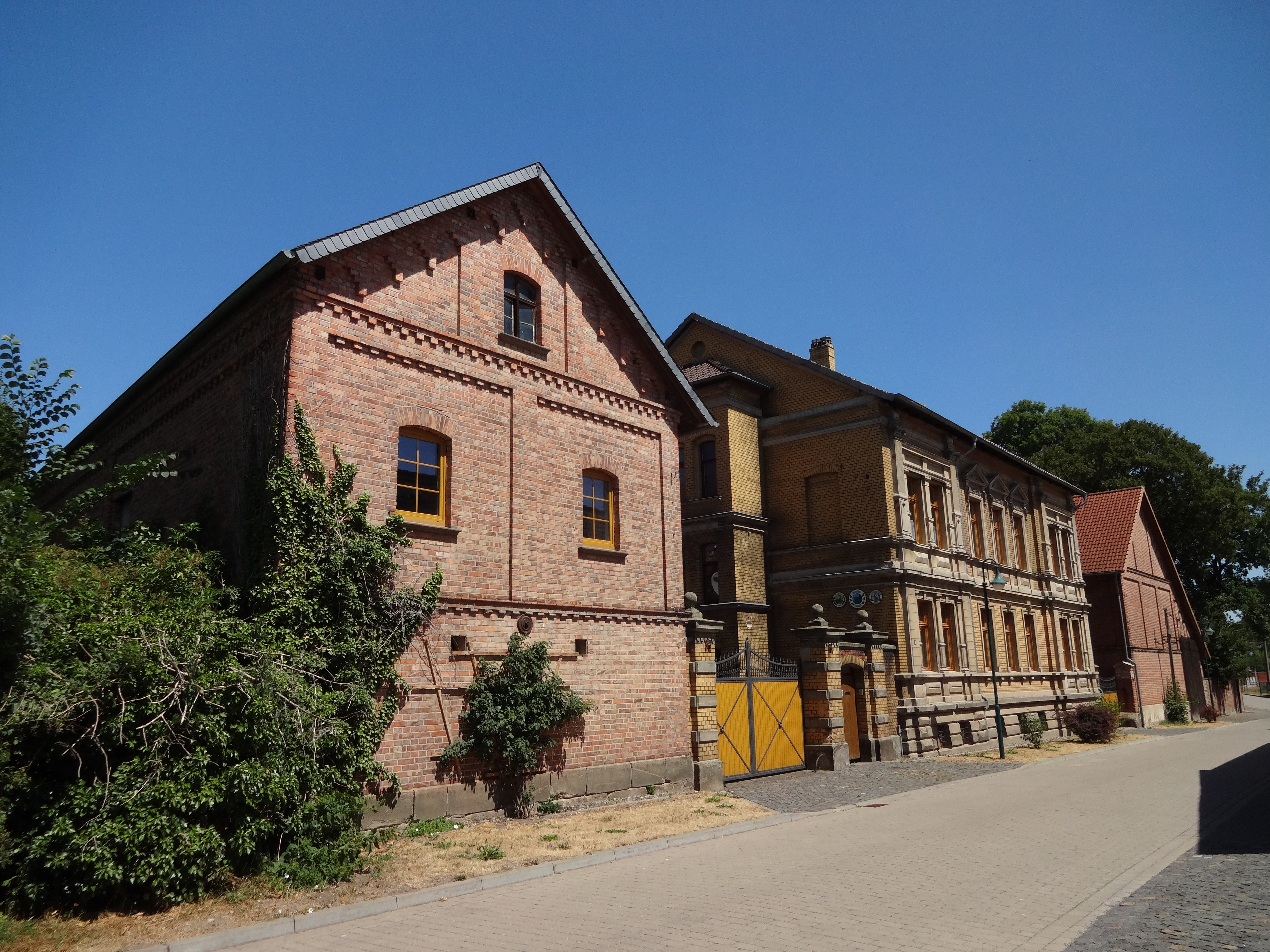 denkmalgeschütztes Bauernhaus in der Hüttenstraße 4 in Dedeleben